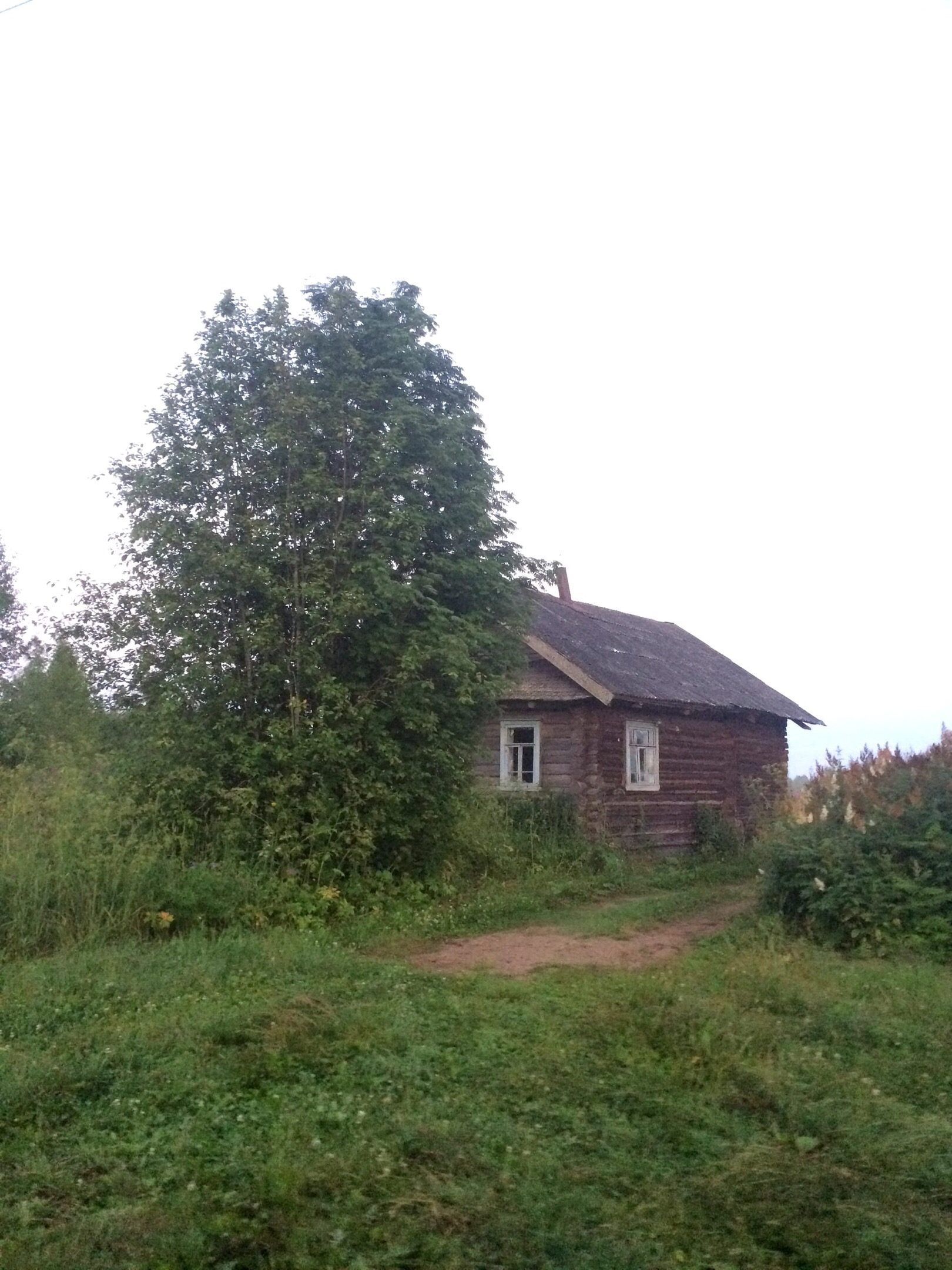 Ранее жилой дом в деревне Речица Тверской области